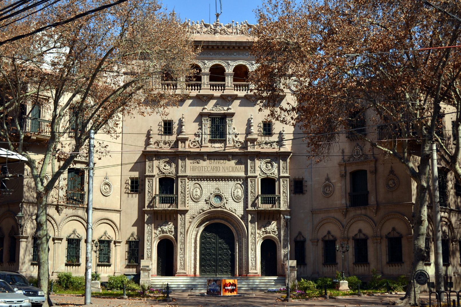 Ex-Sede del Banco Hipotecario Nacional, hoy sede del "Ministerio de Cultura de Mendoza". Calles Gutierre y Av. España, ciudad de Mendoza.